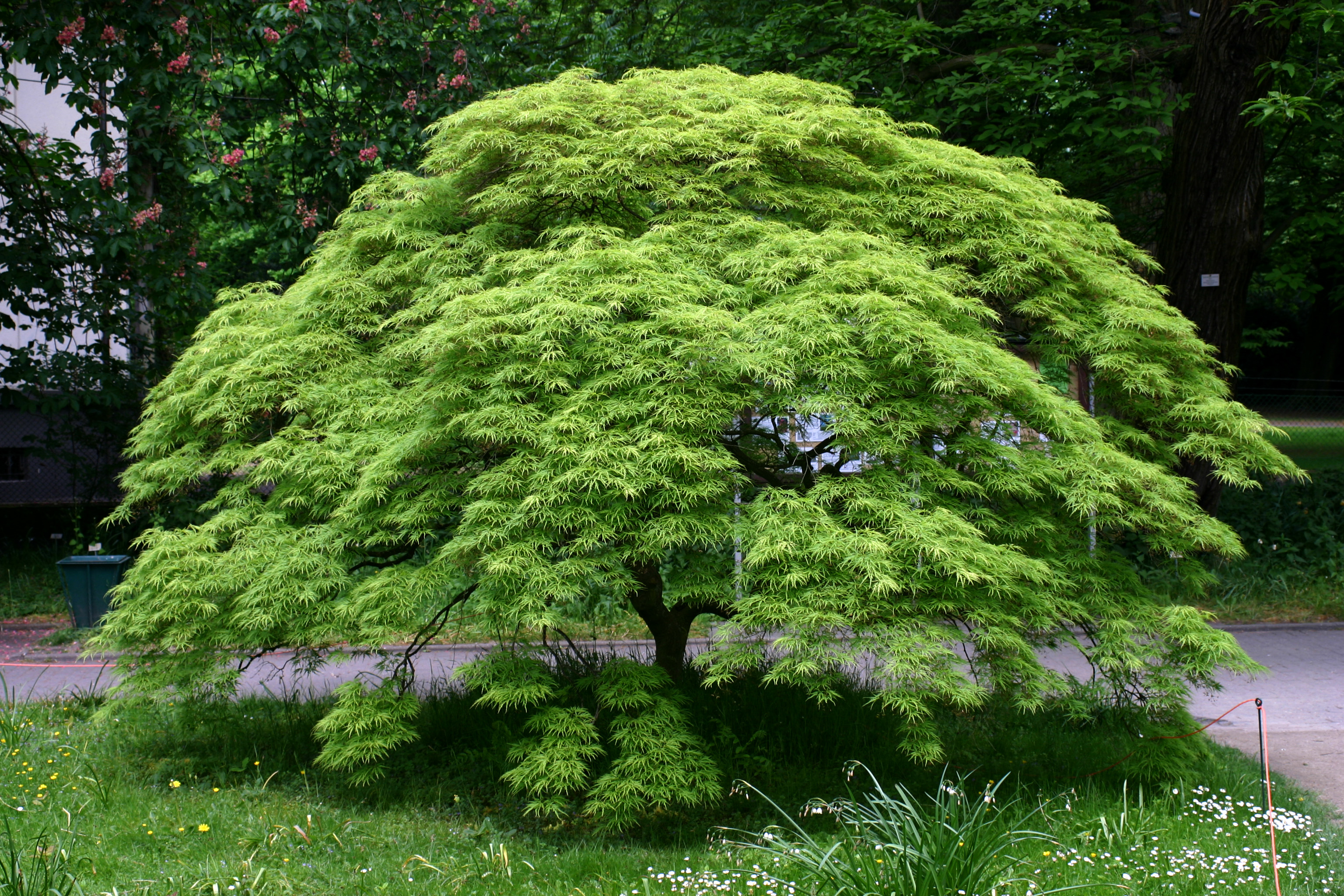 Schlitzblättriger Japanischer Fächerahorn im Botanischen Garten der Westfälischen Wilhelms-Universität Münster - Aceraceae Acer palmatum